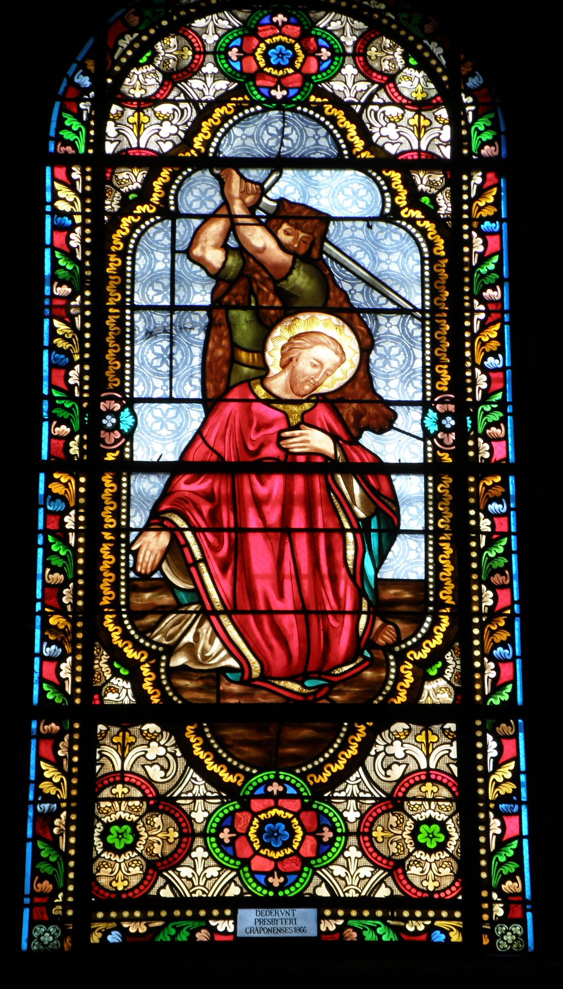 Craponne-sur-Arzon, comm. de la Haute-Loire, France (Auvergne). Église Saint-Caprais, vitrail figurant le martyre de saint Caprais (1866).